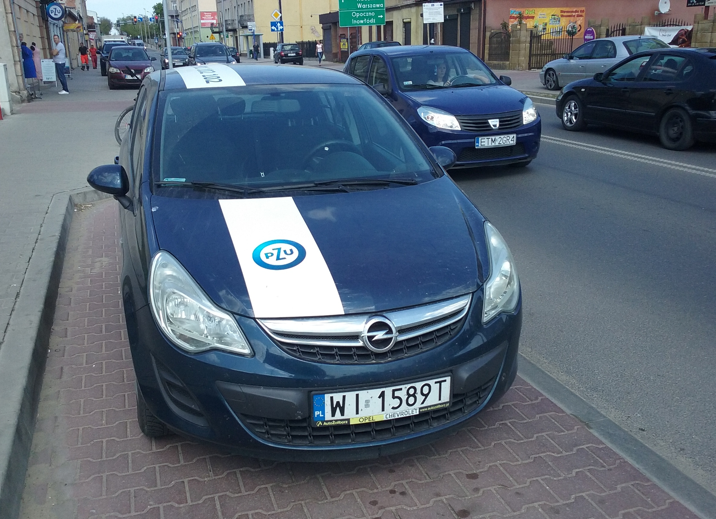 Tomaszów Mazowiecki w województwie łódzkim, PL, EU. Samochód agenta PZU, ul. Warszawska w Tomaszowie, CC0